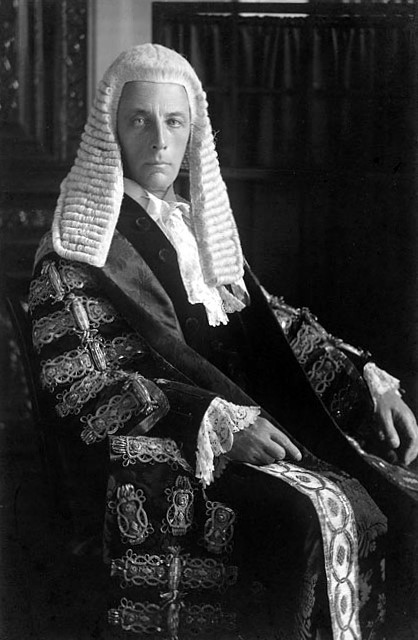 Stanley Buckmaster, 1st Viscount Buckmaster (1861-1934)